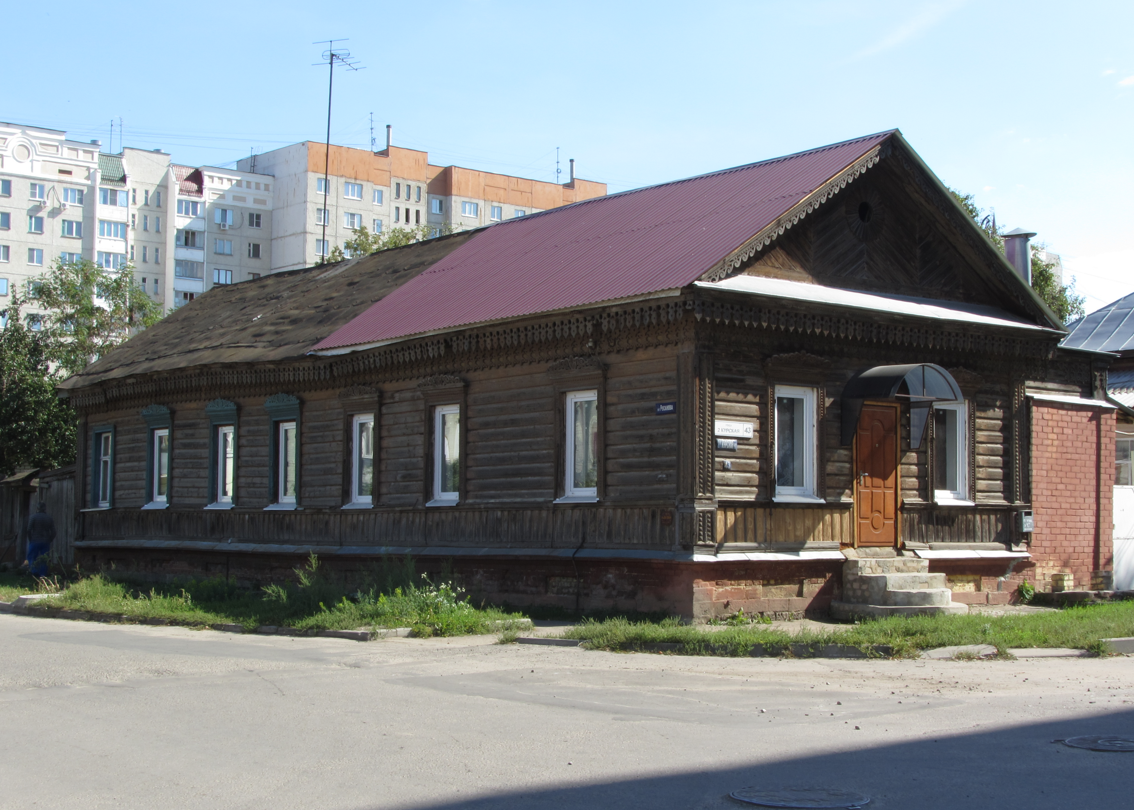 Дом, в котором родился и жил полярный исследователь В.А. Русанов: улица 2-я Курская, 43, Орёл, Орловская область